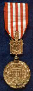 Medalha serviços distintos grau bronze